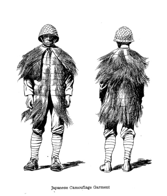 米軍のマニュアルにギリースーツとして記載された蓑